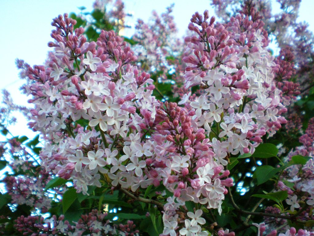 Syringa vulgaris